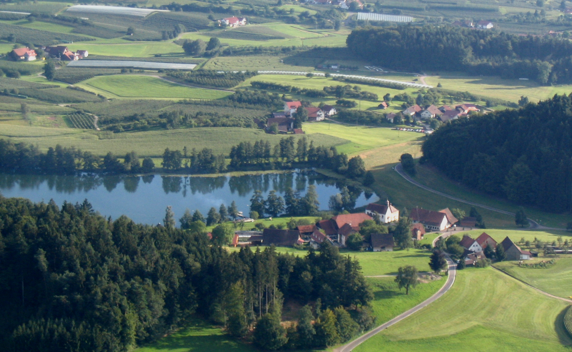 Deutschland - Baden-Württemberg - Bodenseekreis - Kressbronn am Bodensee: der Ortsteil Schleinsee am gleichnamigen See